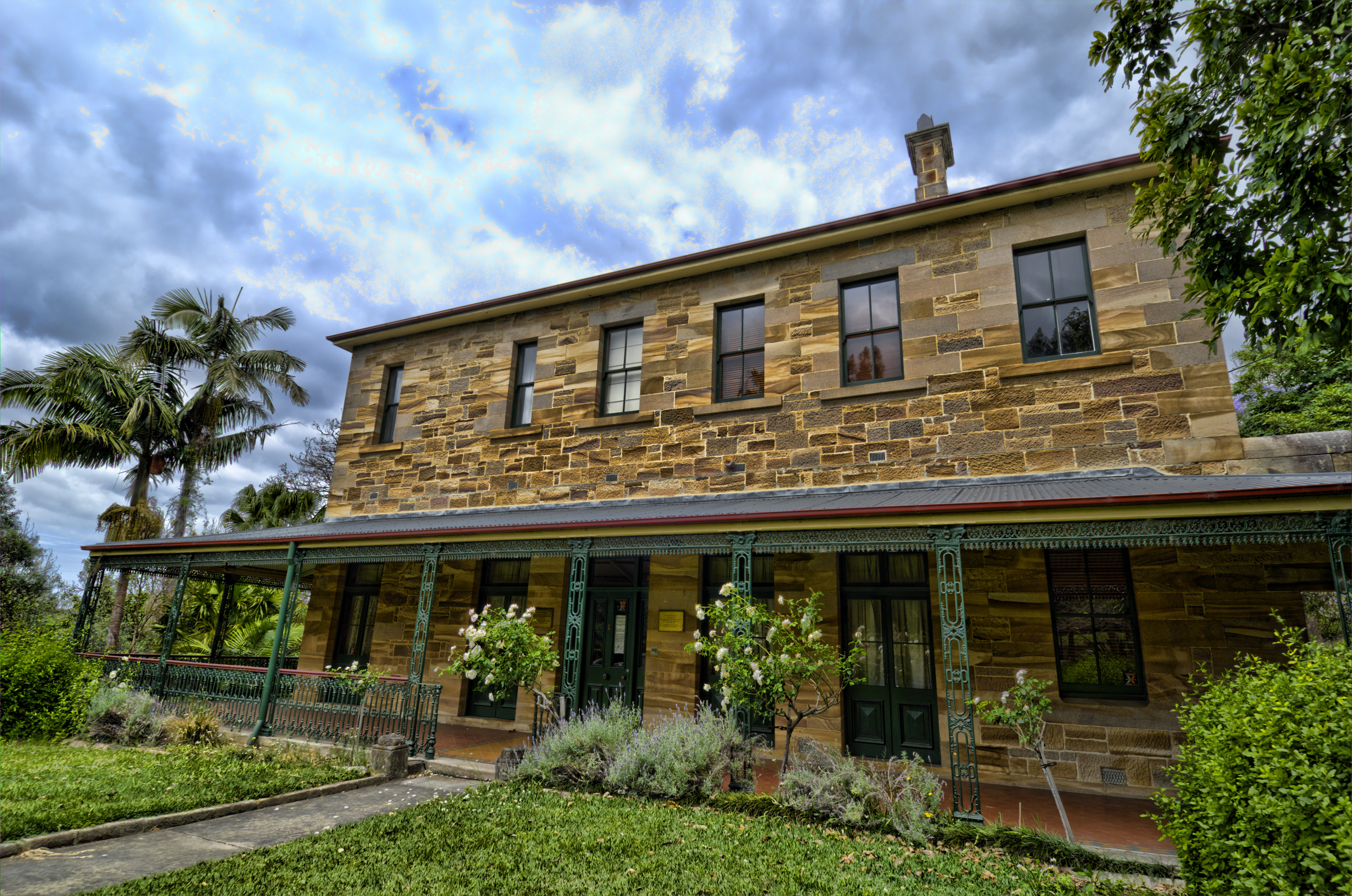 Superintendent's Residence